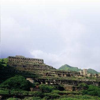 黃金博物館-水湳洞選煉廠